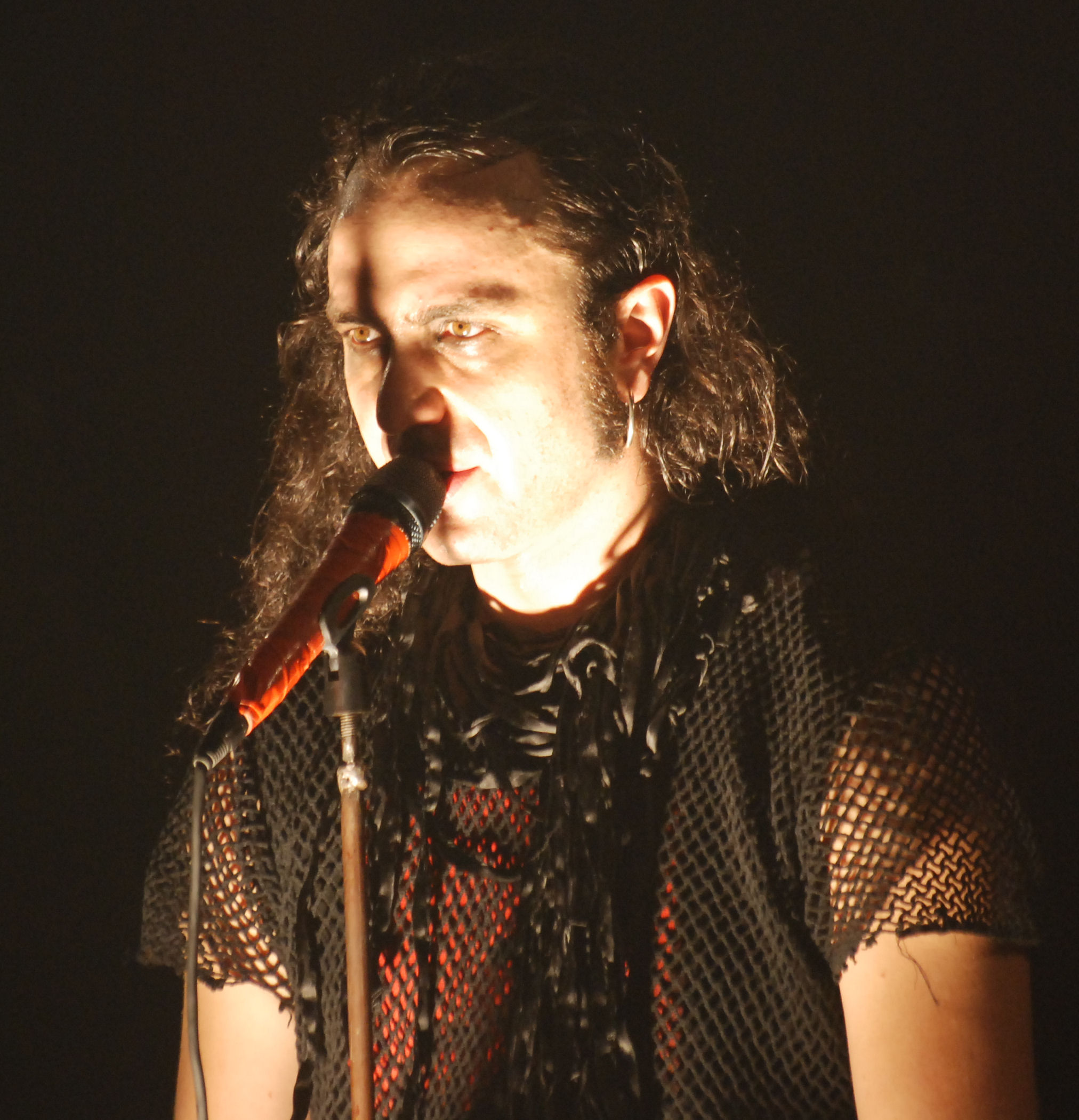 Koncert Moonspell'a (Fernando Ribeiro) w klubie Studio w Krakowie